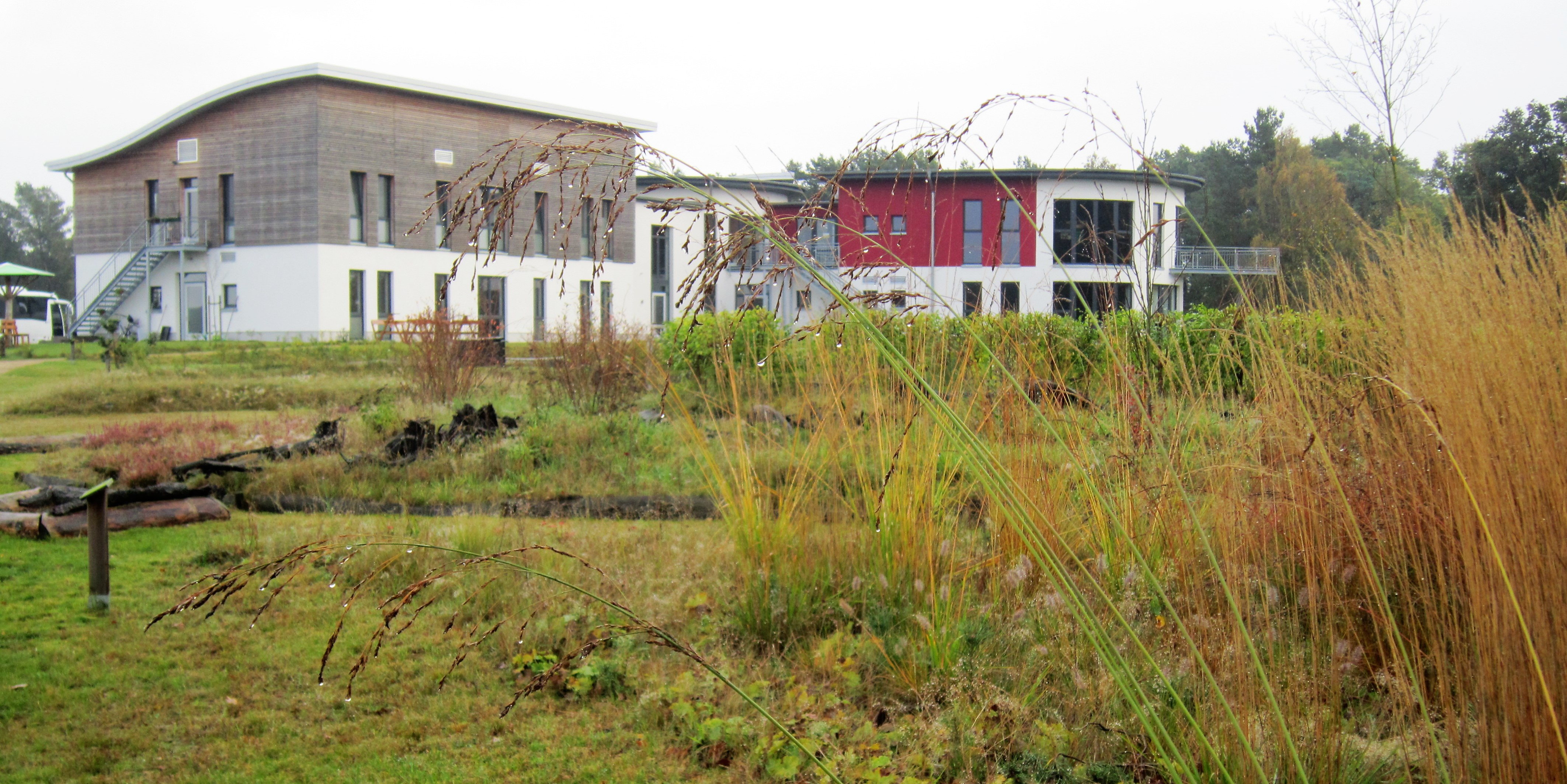 Rückansicht des Europäischen Fachzentrums Moor und Klima (EFMK) in Ströhen (Gemeinde Wagenfeld im Landkreis Diepholz / Niedersachsen); im Vordergrund der Barfußpfad